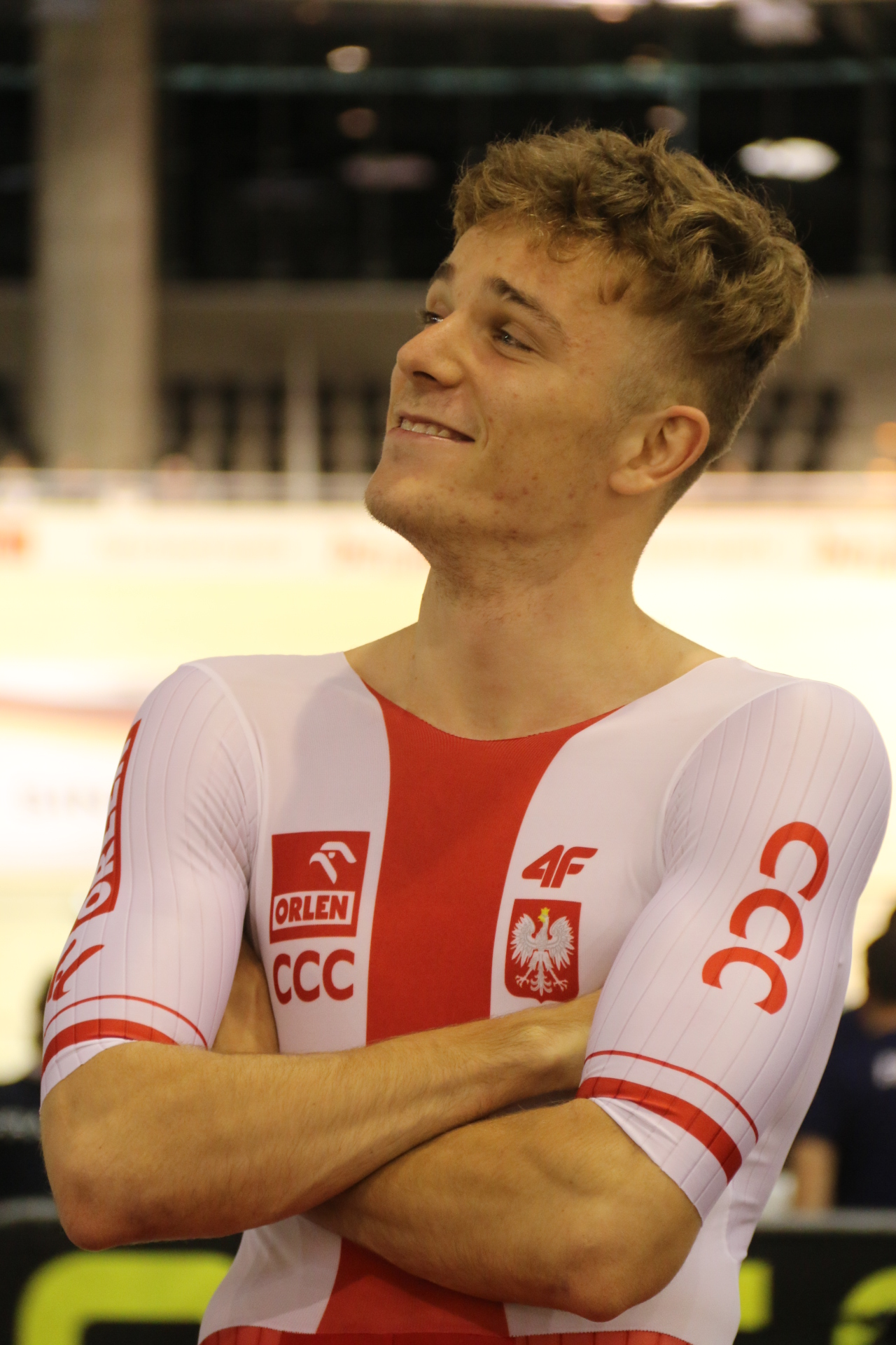 Daniel Staniszewski, polnischer Radsportler